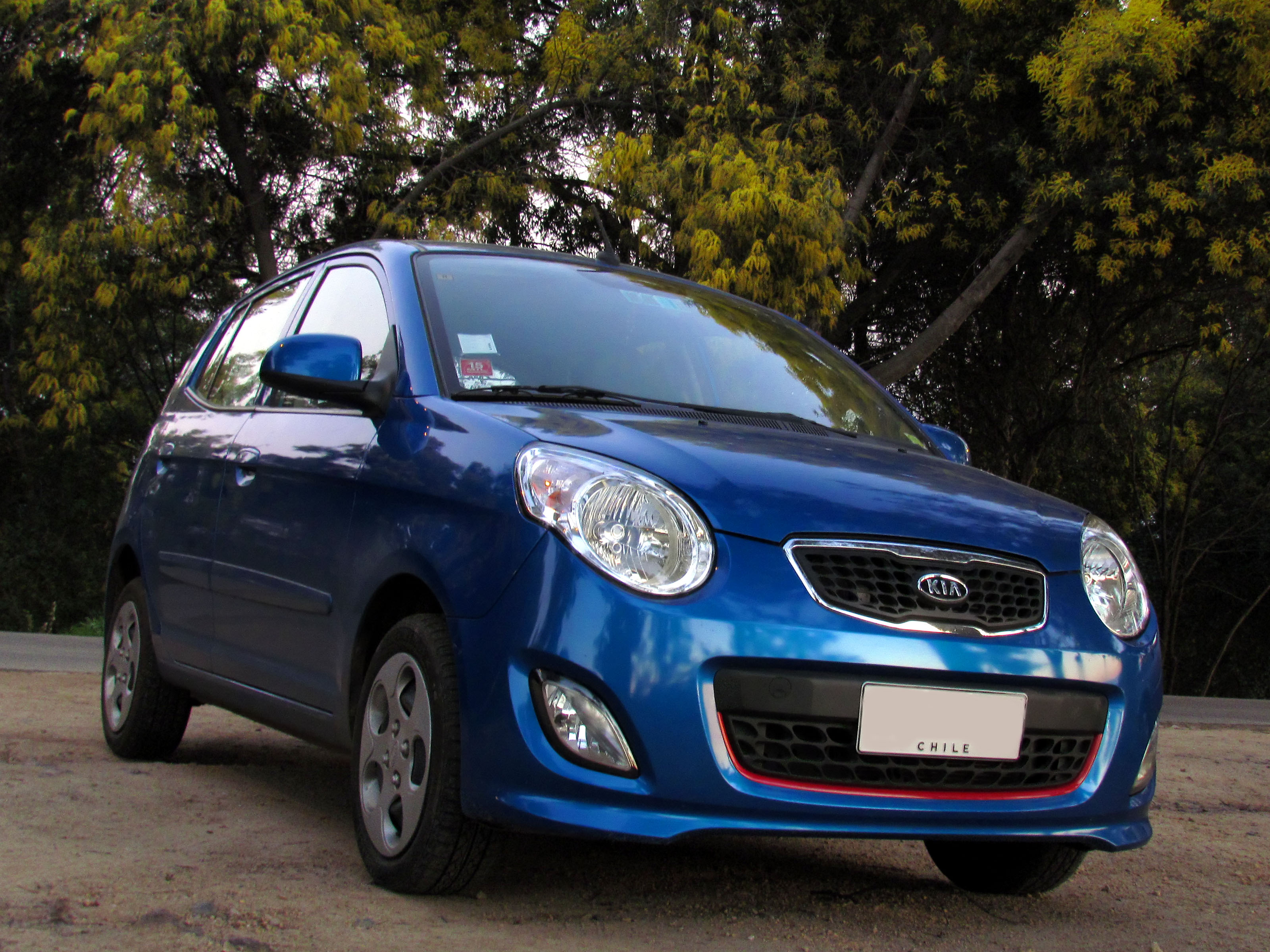 Kia Morning 1.1 EX 2011